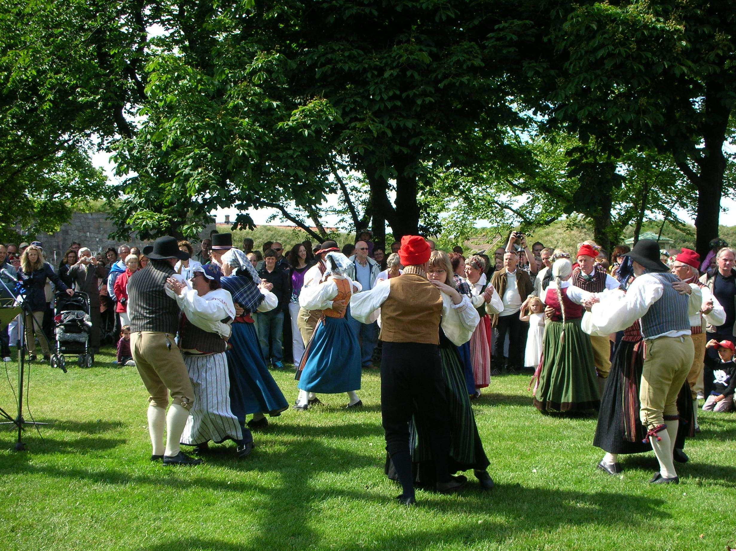 Medlemmar ur hembygdsföreningen Gamla Varberg som bär folkdräkt och håller en uppvisning med traditionella danser vid vid midsommarfirande i Varberg 19 juni 2009.